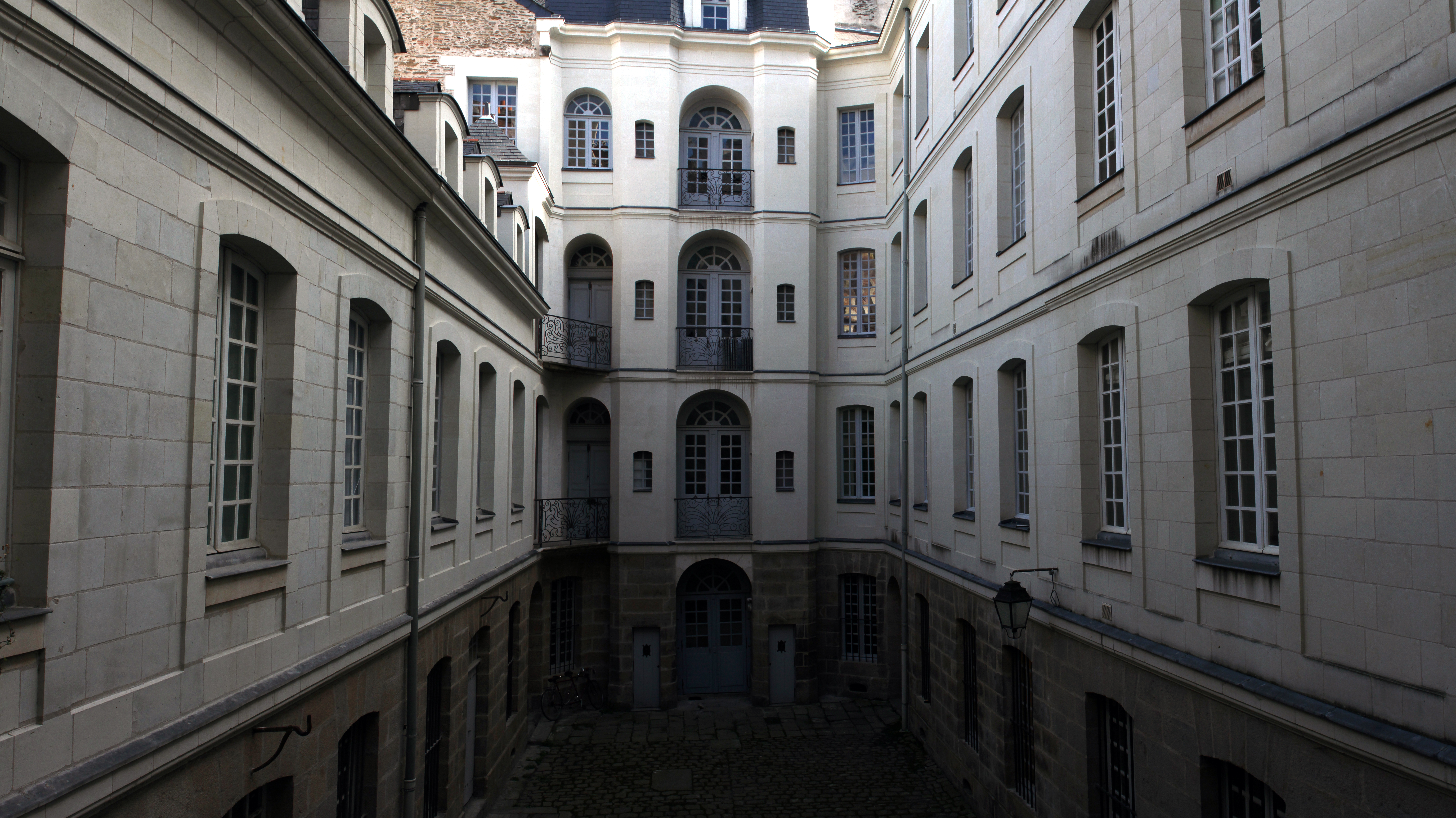 This building is en partie classé, en partie inscrit au titre des Monuments Historiques. .